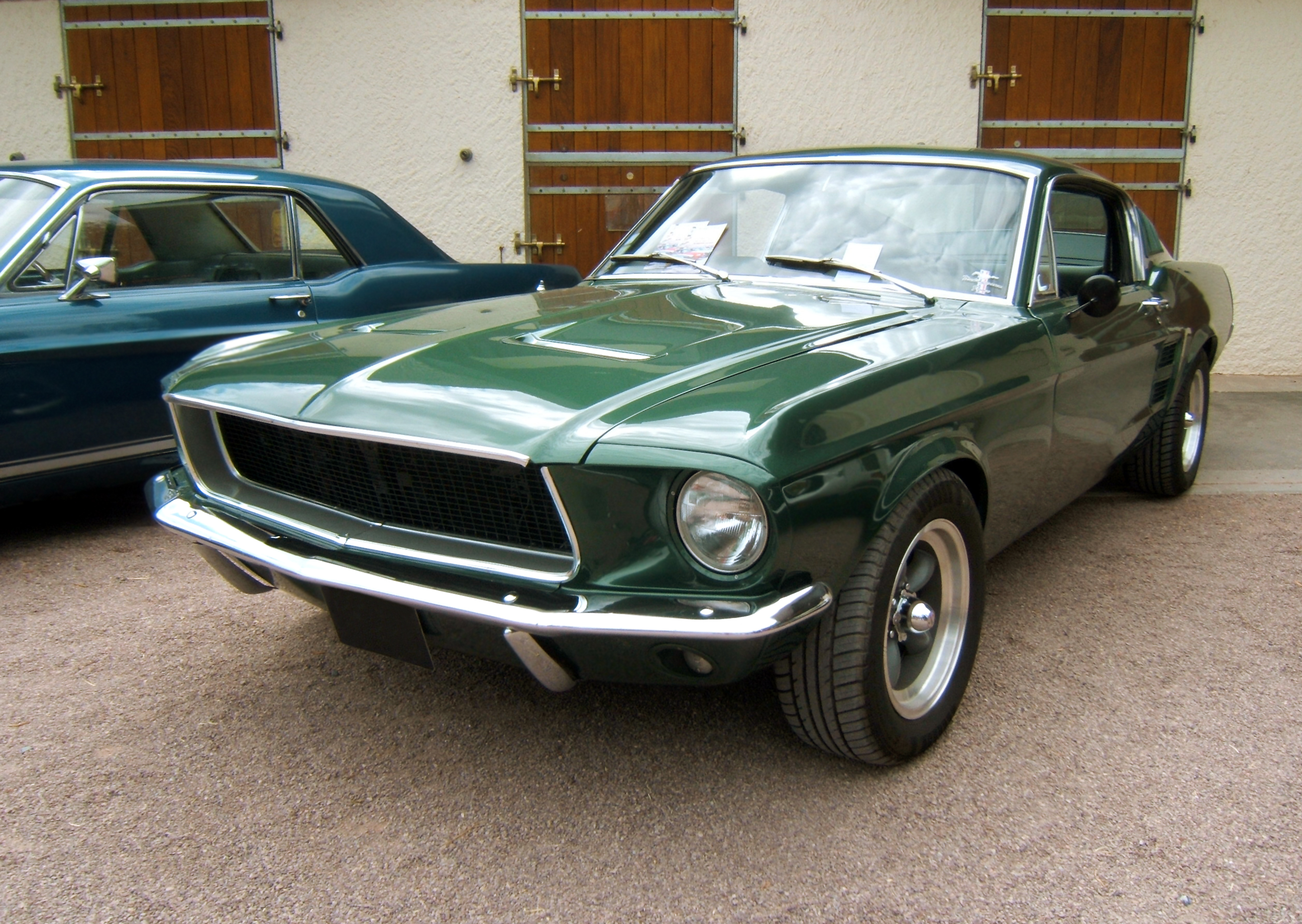 Ford Mustang Fastback Bullit.